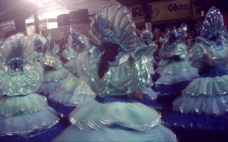 Ala das baianas da escola de samba Acadêmicos da Abolição, segunda a desfilar na 4ª divisão do Carnaval do Rio de Janeiro, estrada Intendente Magalhães.